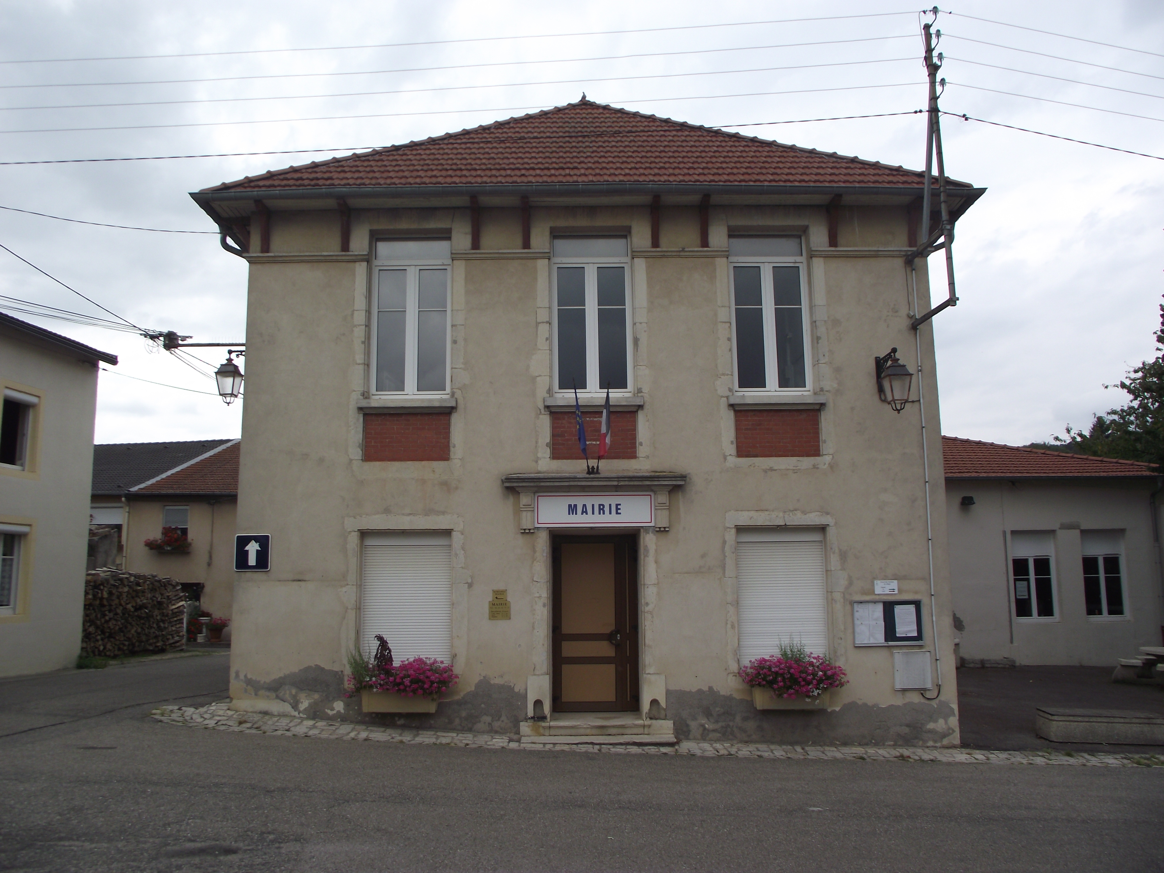 Mairie de Viterne